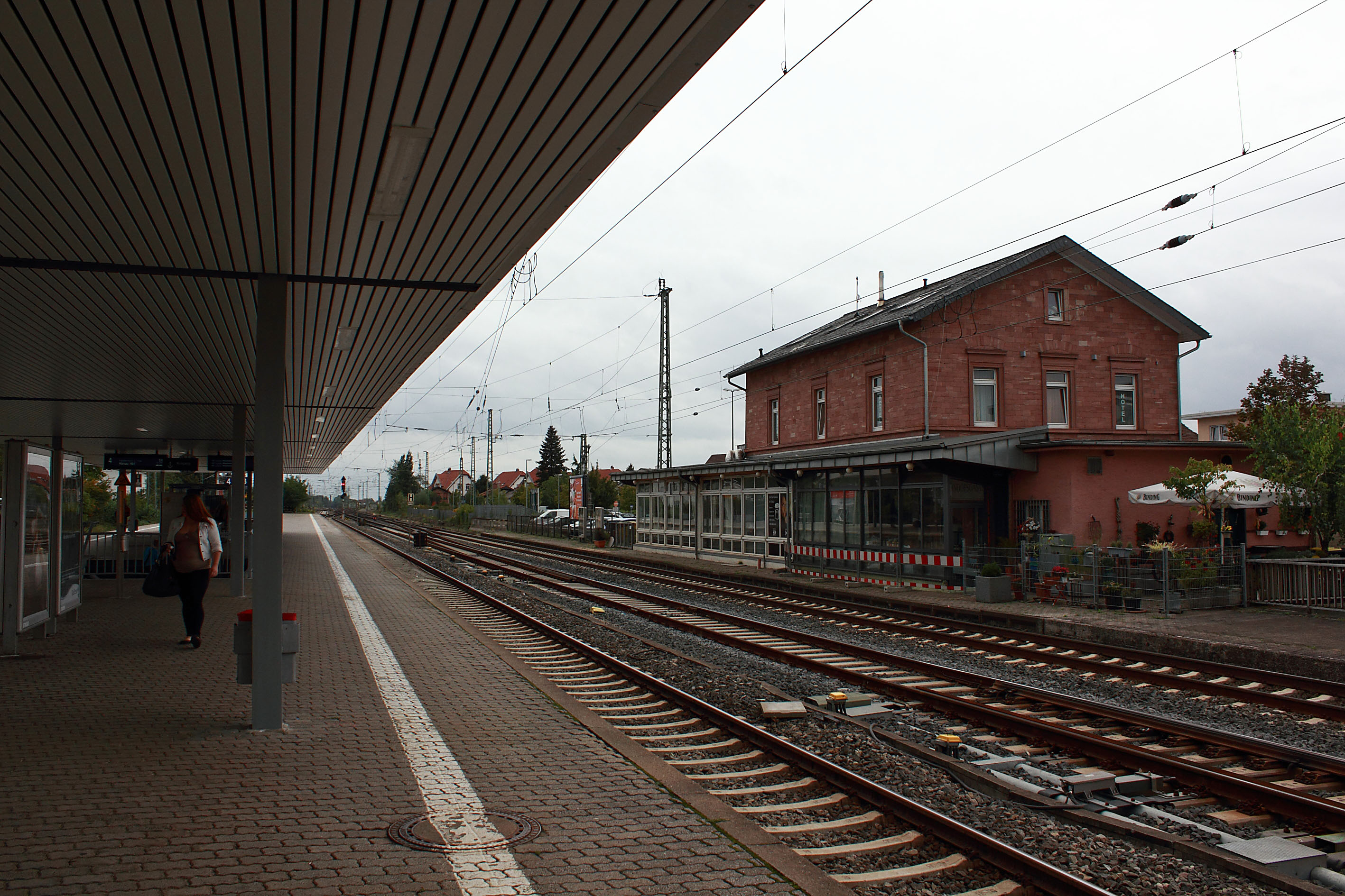 Historisches Empfangsgebäude des Kelsterbacher Bahnhofs